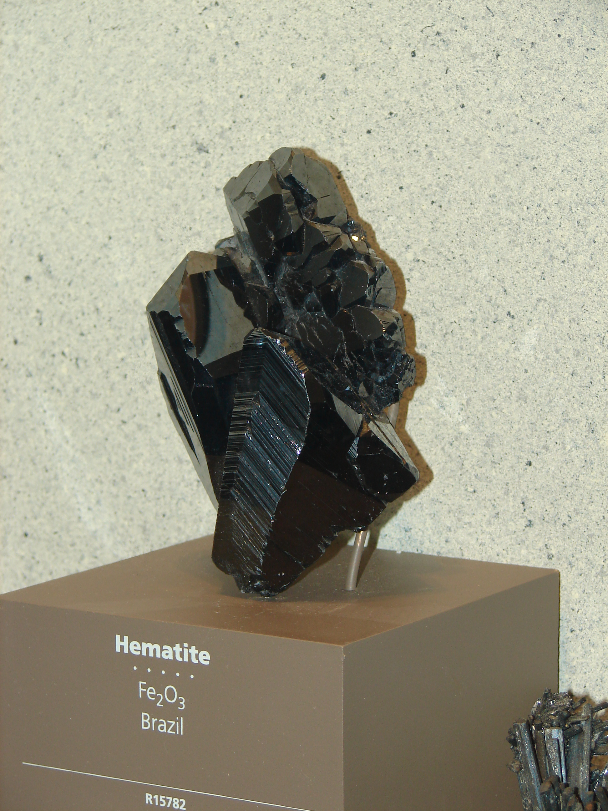 ബ്രസീലിൽ കുഴിച്ചെടുത്ത ഹെമറ്റൈറ്റ്. വാഷിംഗ്ടൺ ഡി.സിയിലെ സ്മിത്സോണിയൻ മ്യൂസിയം ഓഫ് നാച്ചുറൽ ഹിസ്റ്ററിയിൽ പ്രദർശിപ്പിച്ചിരിക്കുന്നത്.